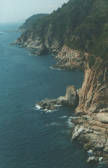 קוסטה בראבה. taken by דודי שטרן